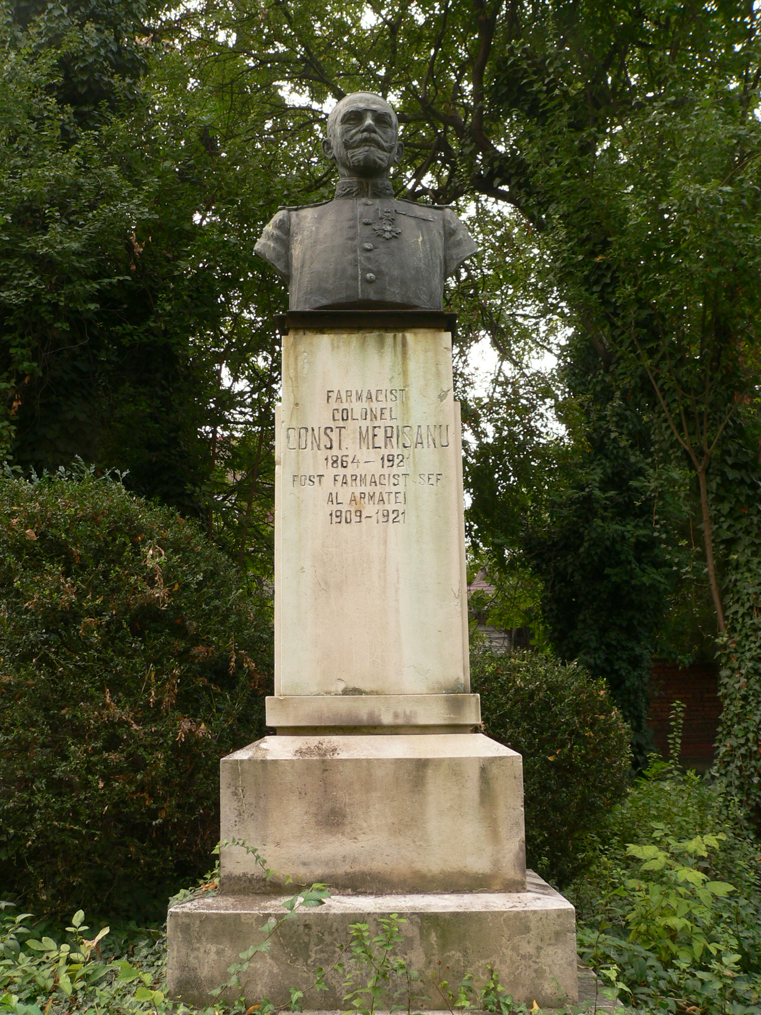 Bustul col. farmacist Constantin Merișanu